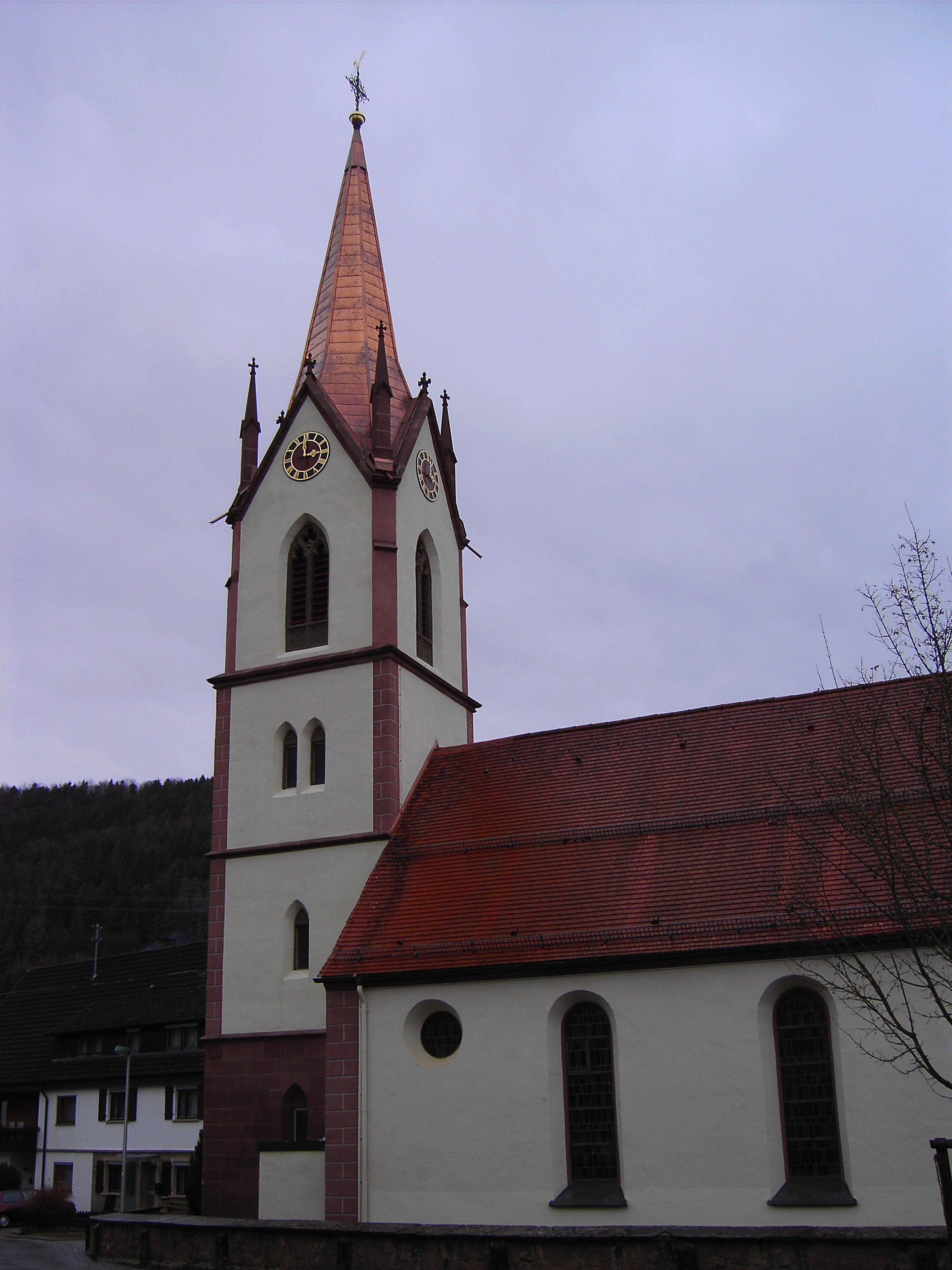 Kirche Sankt Gallus in Glatt (Sulz am Neckar).